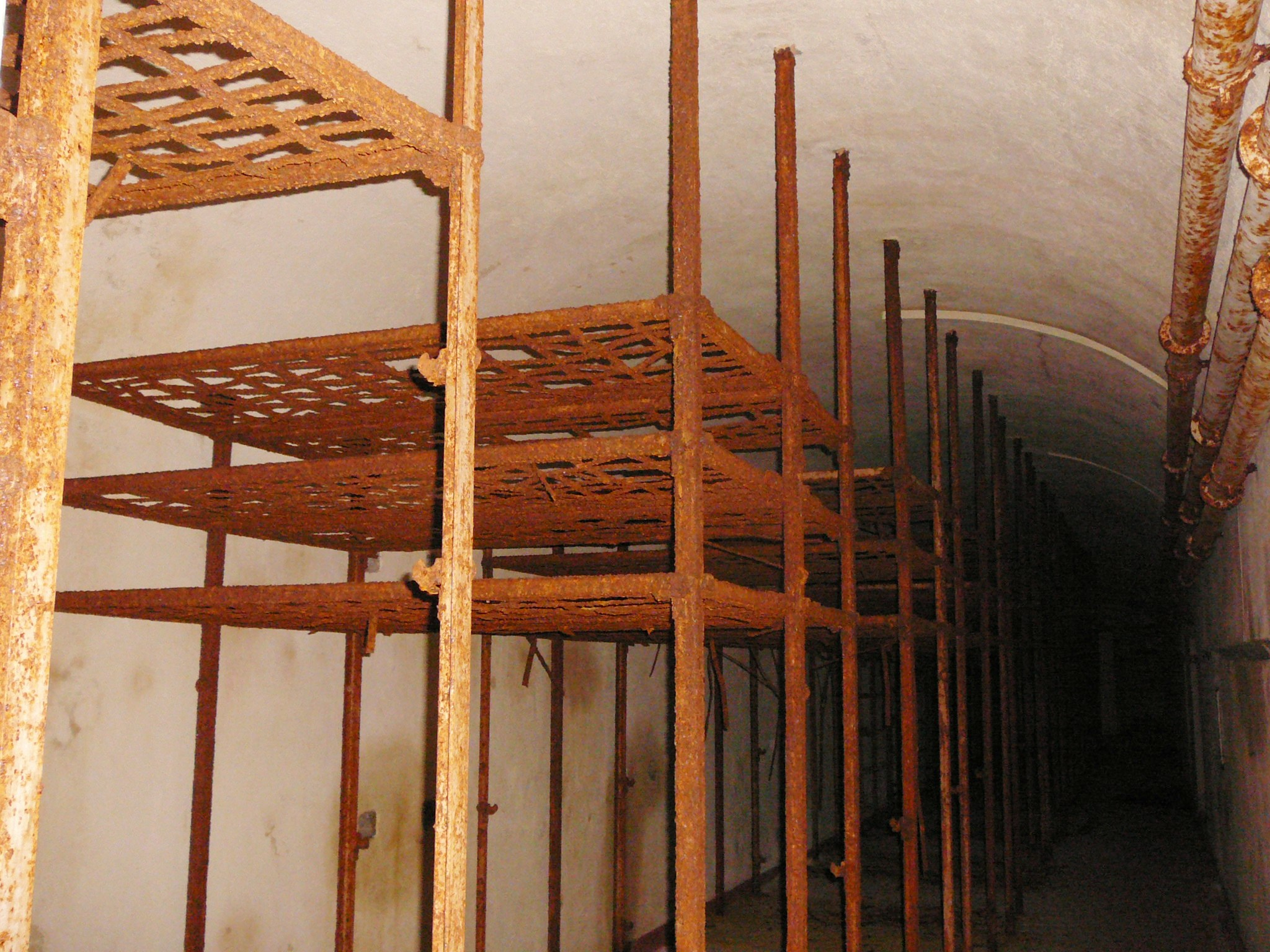 opera 1, cimabanche